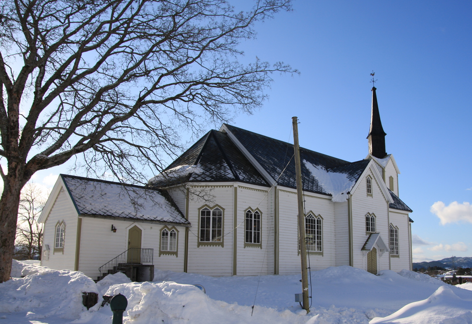 Skodje kirke